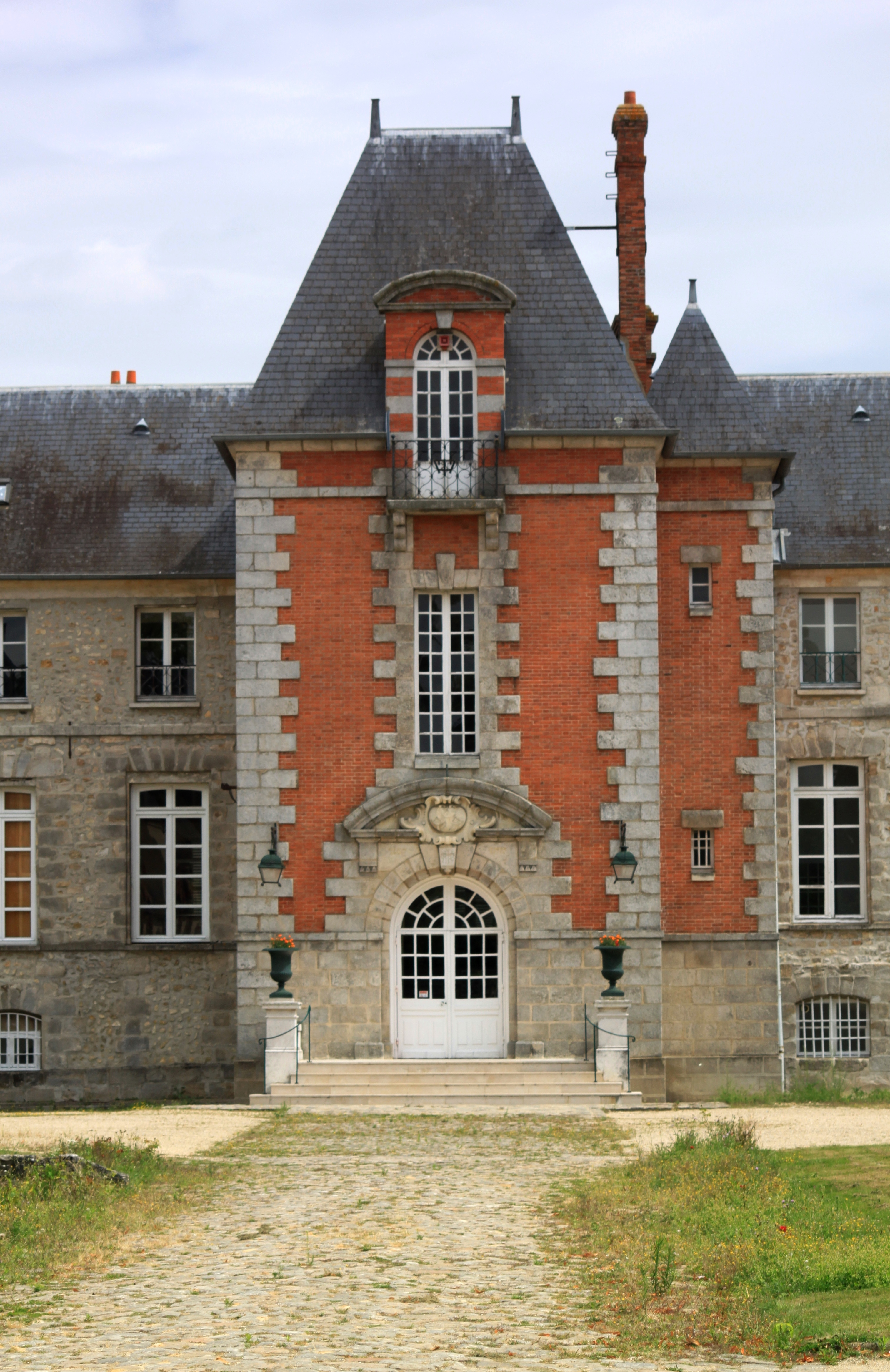 L'entrée principale du château de Gillevoisin - Cadre du film Les Grandes Vacances.